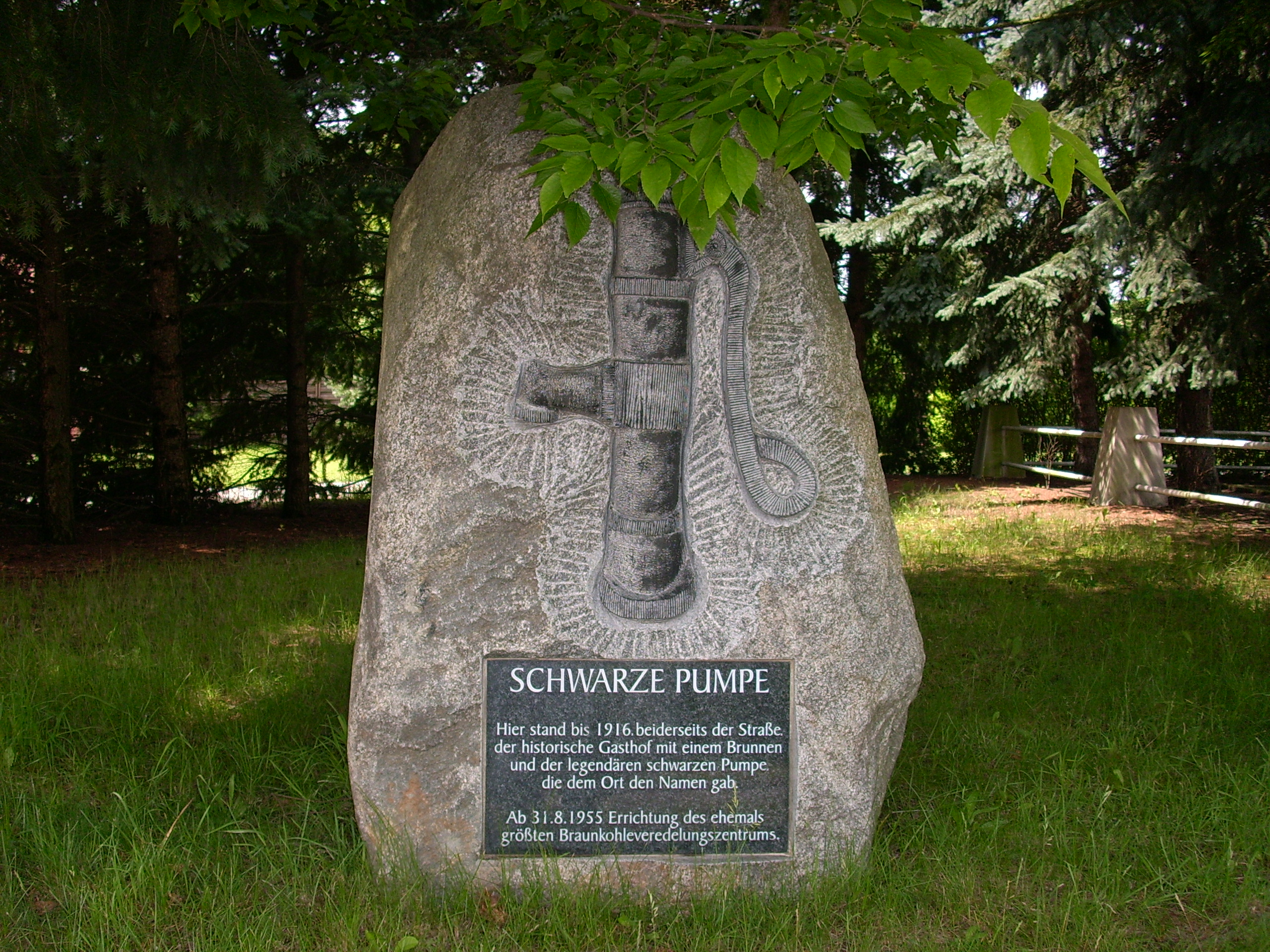 Gedenkstein für den ehemaligen Gasthof an der Dresdener Chaussee in Schwarze Pumpe, Ortsteil von Spremberg